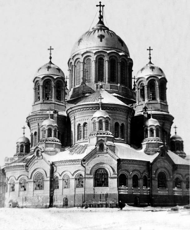 Самара. Кафедральный собор. Фотография. ~1900-е годы.